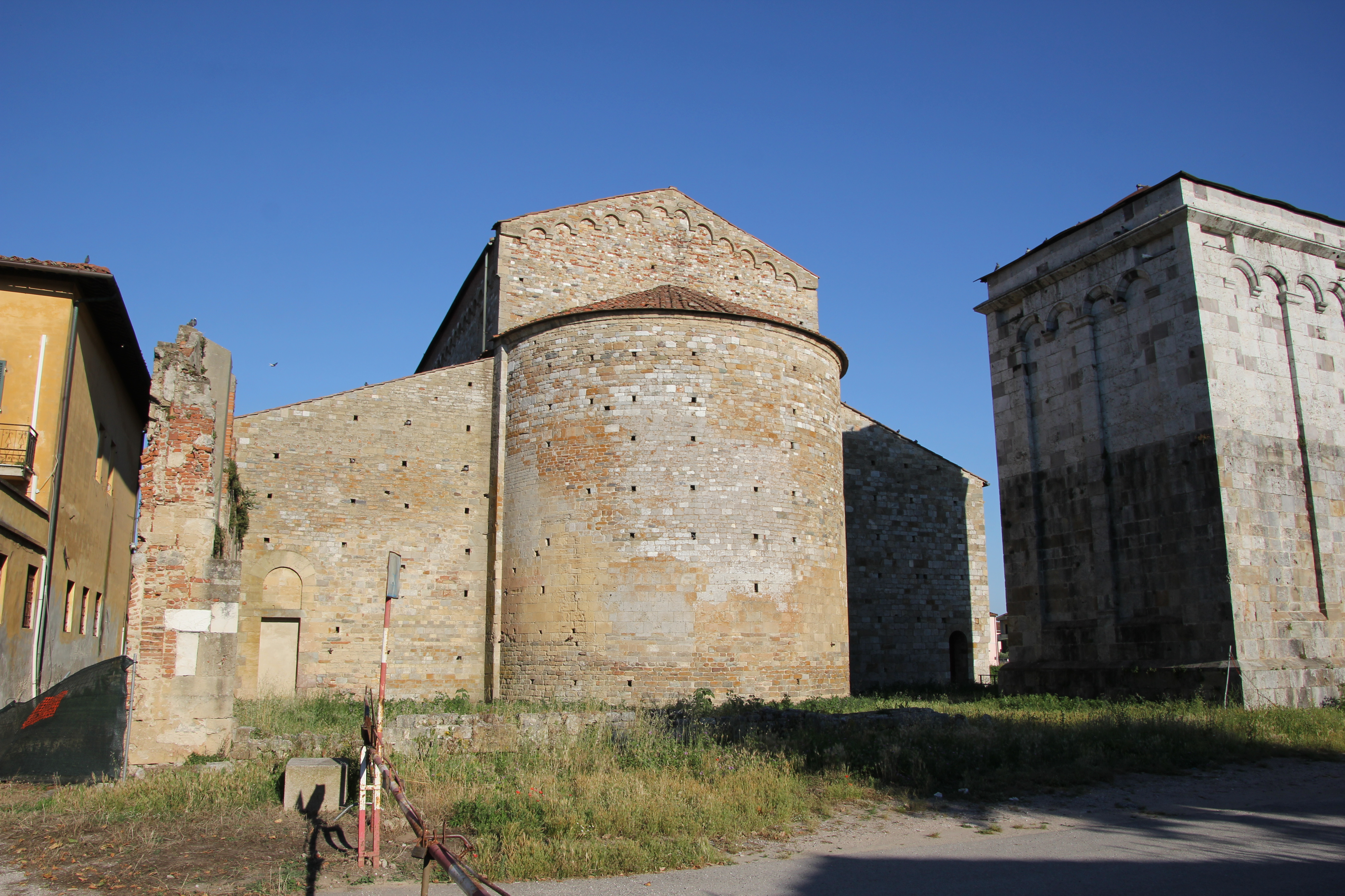 Pisa, basilica di San Pietro Apostolo